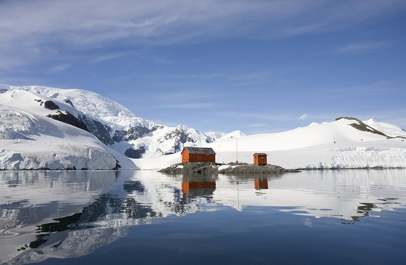 magic Antarctica